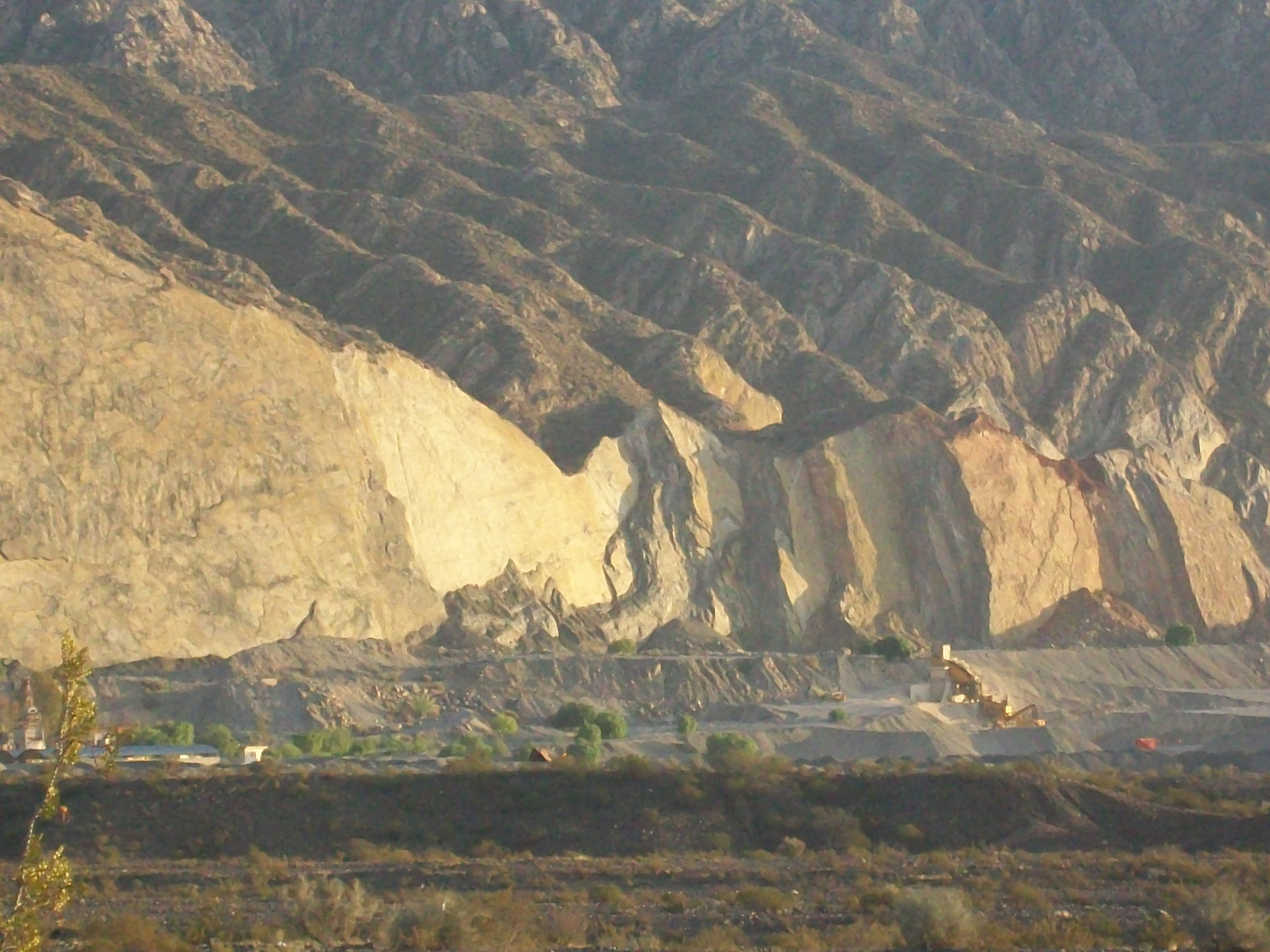 Vista de la serranías de Villicúm, departamento Albardón, provincia de San Juan, Argentina